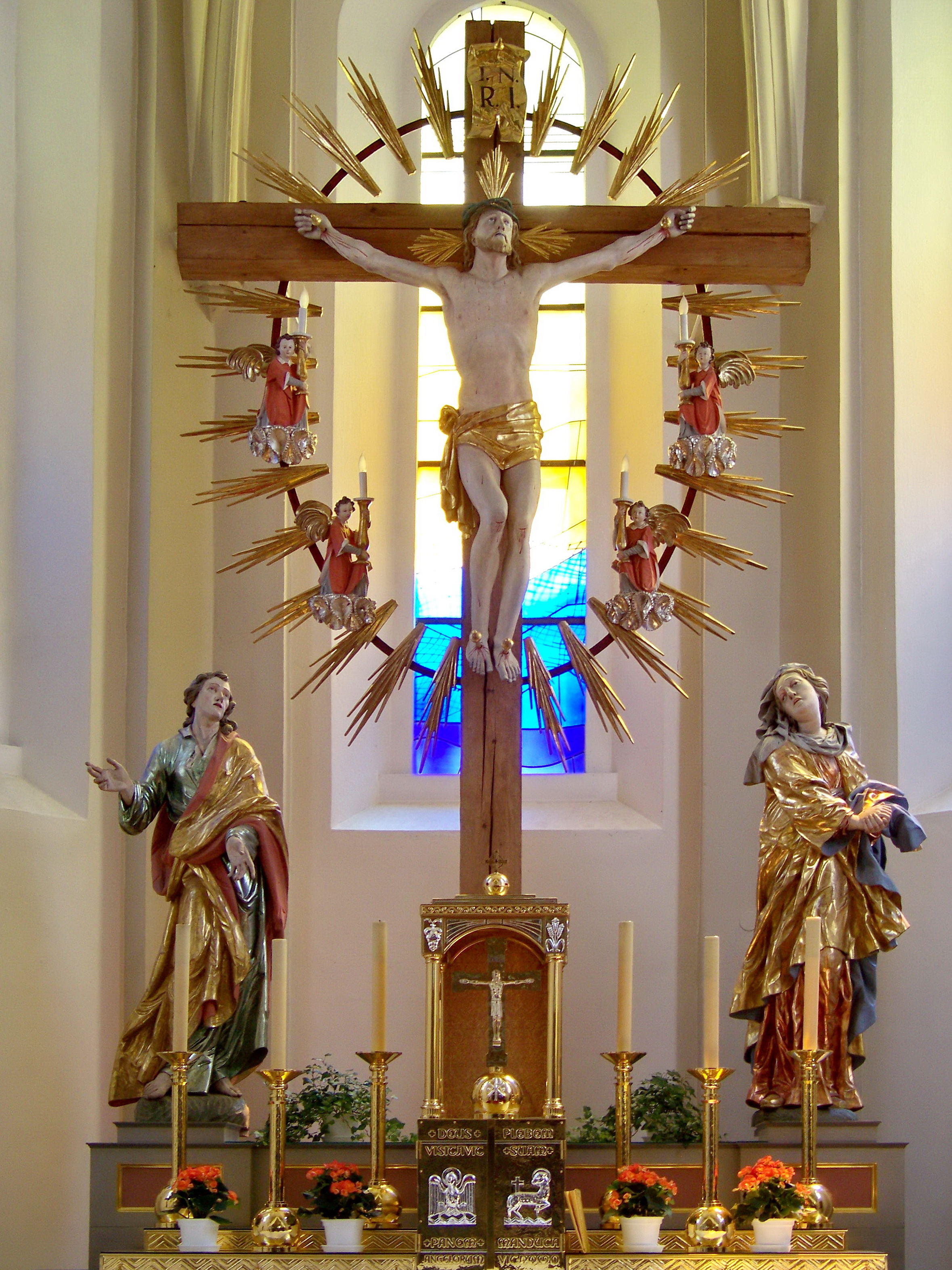 Laberweinting, Hofkirchen 77, katholische Pfarrkirche St. Peter erbaut 1863/64. Der Kreuzaltar wurde 1959 im Rahmen einer umfassenden Kirchenrenovierung anstelle eines neuromanischen Altars aus der Erbauungszeit errichtet. Christus ist von einem ovalen Strahlenkranz mit vier barocken Leuchterengeln umgeben. Der Kreuzbalken wurde von der Zimmerei Roider aus Weichs gefertigt. Der lebensgroße Korpus aus der Mitte des 18. Jahrhunderts stammt aus der 1935 abgebrochenen Kirche Mariä Himmelfahrt in Neufahrn (Niederbayern), da er stilistisch und räumlich nicht in den Neubau von 1938 passte. Die Seitenfiguren Johannes und Maria wurden 1959 im Rahmen der Kirchenrenovierung mit weiteren älteren aber restaurierten Figuren zugekauft. Über das Entstehungsjahr der sicherlich älteren Figuren oder deren früheren Standort konnte nichts mehr in Erfahrung gebracht werden. Unterlagen sind nicht vorhanden. Der damalige Pfarrer J. K. ließ keine Kirchenrechnung führen, sondern sammelte von Haus zu Haus in der gesamten Pfarrei und bezahlte alle Anschaffungen und Arbeitslöhne aus einer Zigarrenkiste in bar.